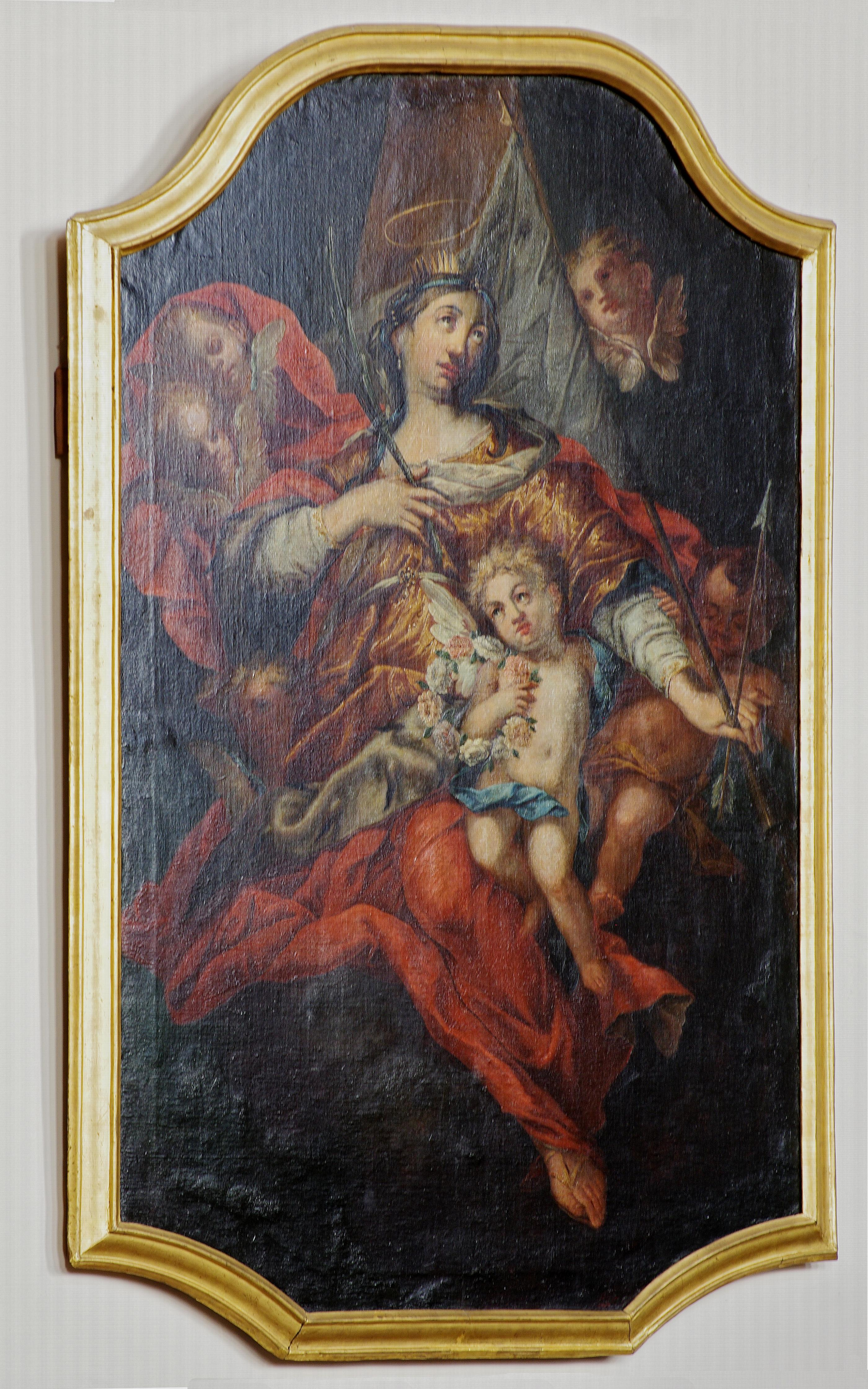 Bilder aus dem Innenraum der Ursulakirche